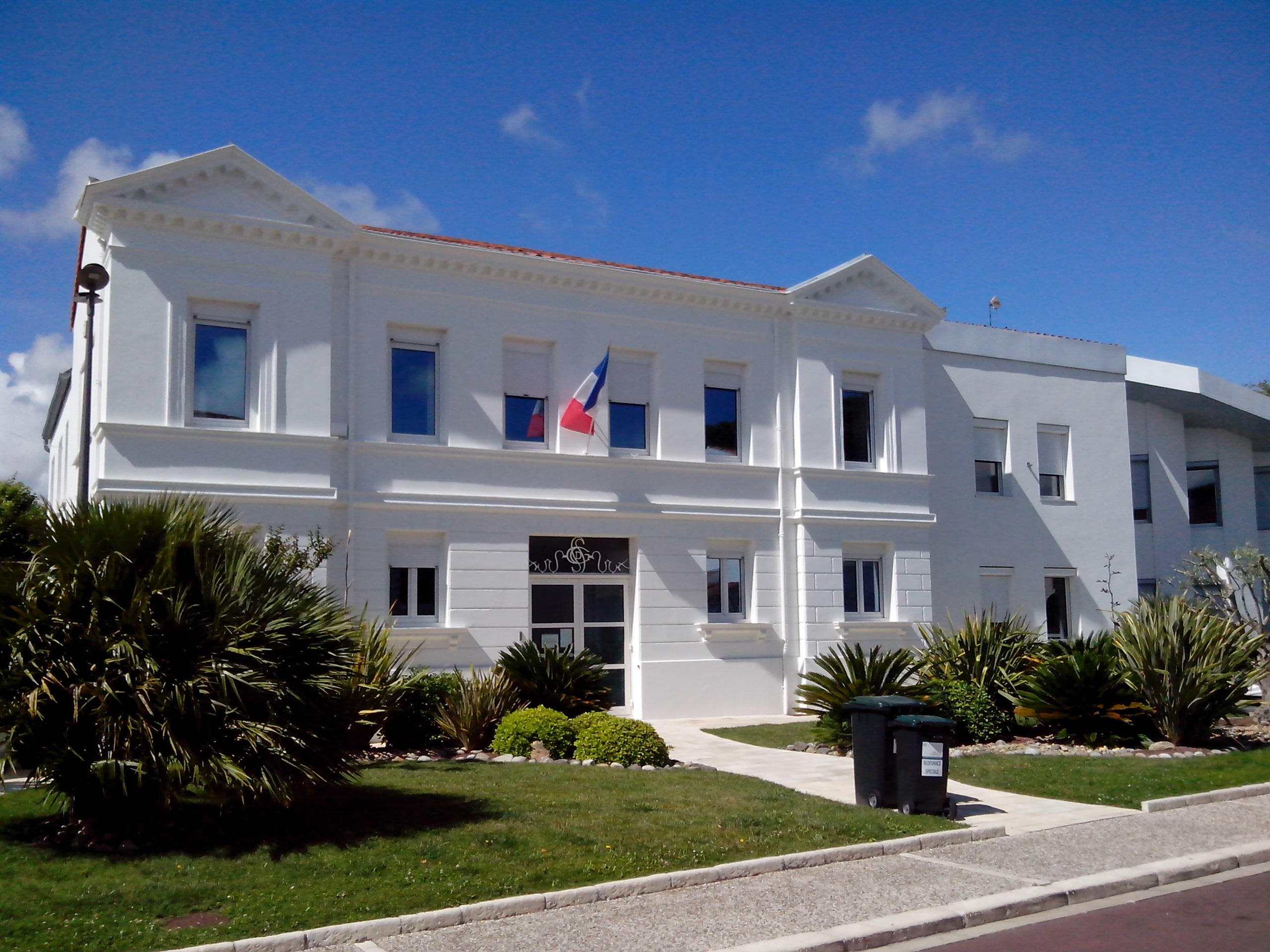 Mairie de St Georges-de-Didonne